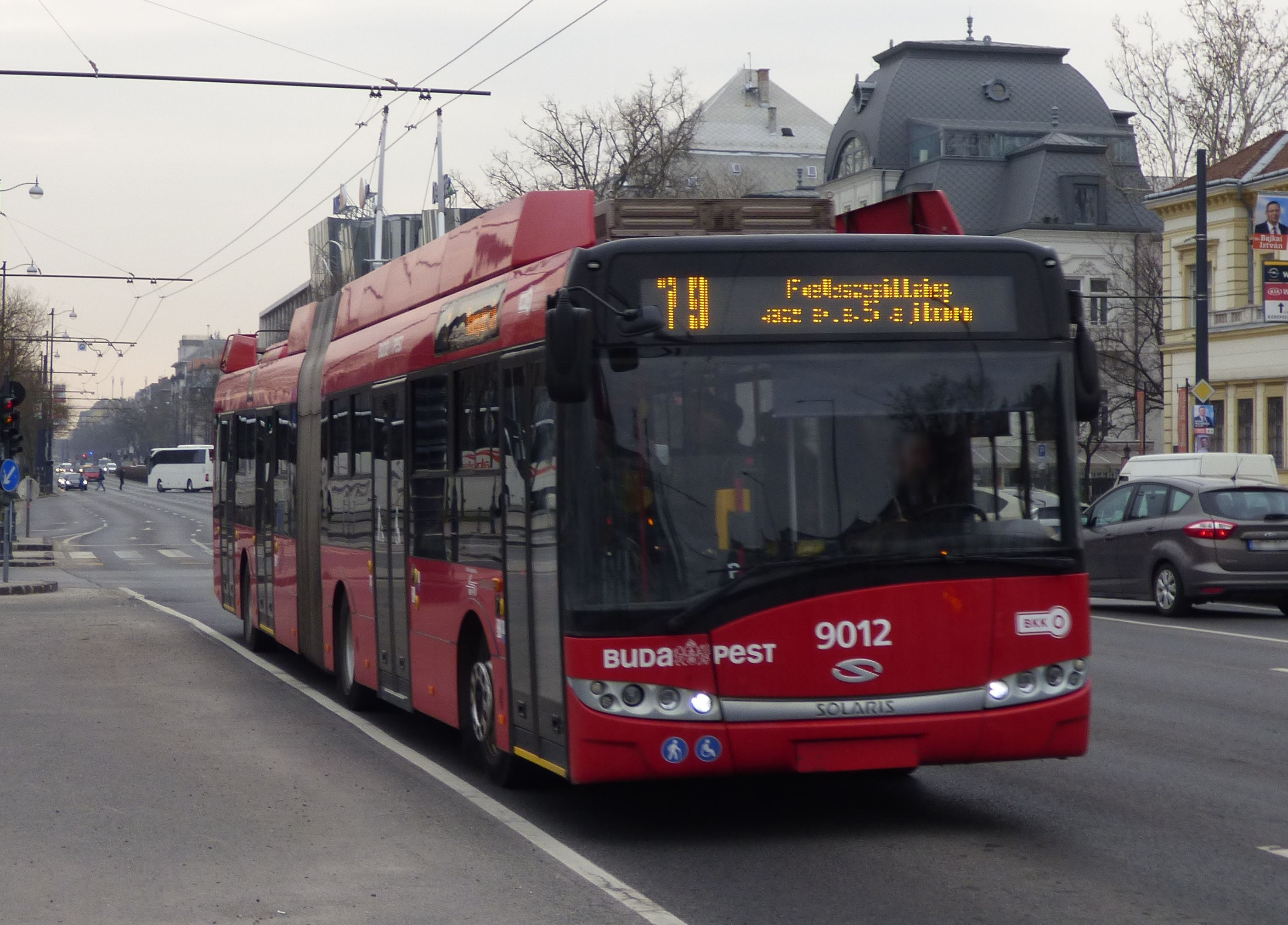 79-es jelzésű Solaris Trollino 18-as trolibusz a Hősök terénél (psz. 9012)